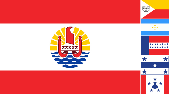 Drapeau officiel de la Polynésie françaises à côté des drapeaux informels des îles Marquises, de la Société, Tuamotu, Gambier et Australes.